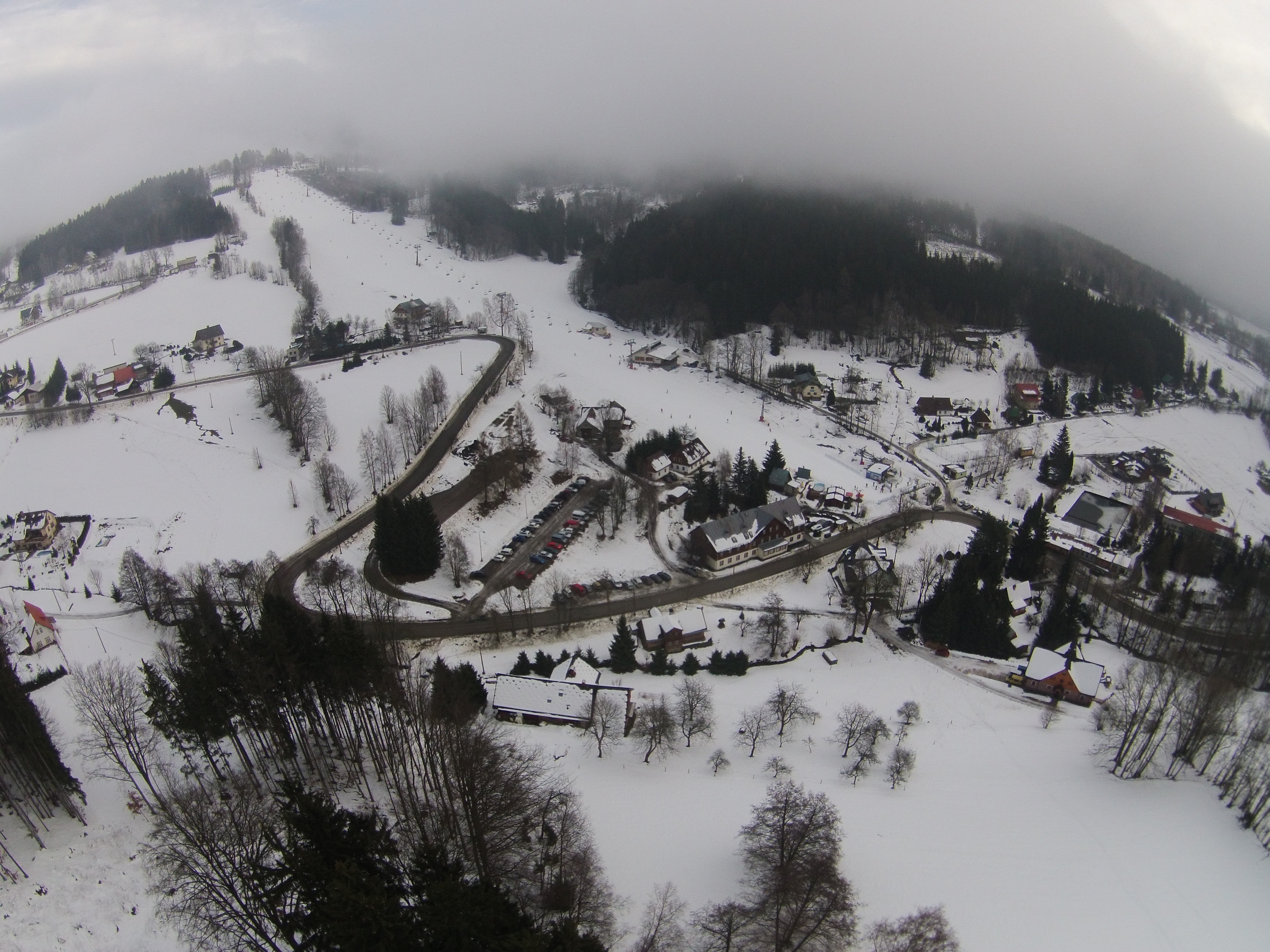 Celkový pohled. Štěpanická Lhota.